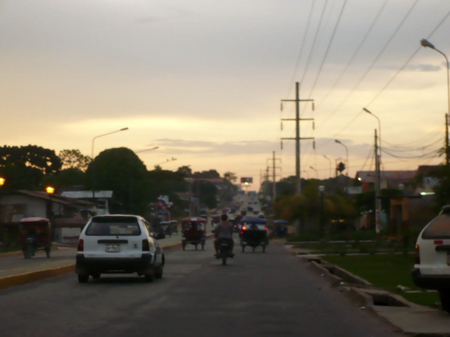 Vista frontal de la cuadra 18 de la avenida de Yarinacocha. Esta es la parte central de su vía Pucallpa (distrito de Callería) y Puerto Callao (distrito de Yarinacocha).